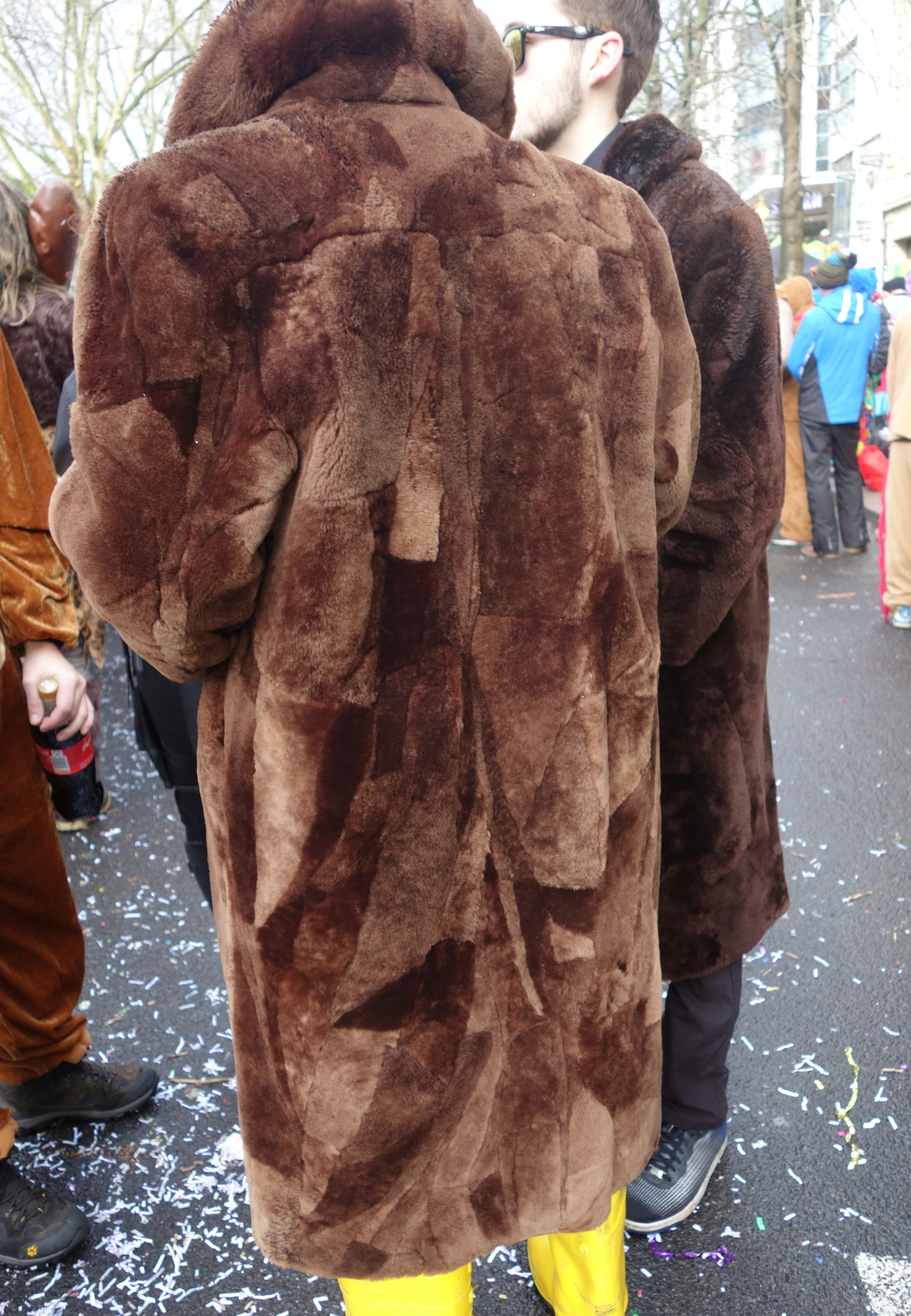 Pelze auf der Düsseldorfer Königsallee, Karnevalssonntag 2018. Zwei alte Biberlammstücken-Mäntel.